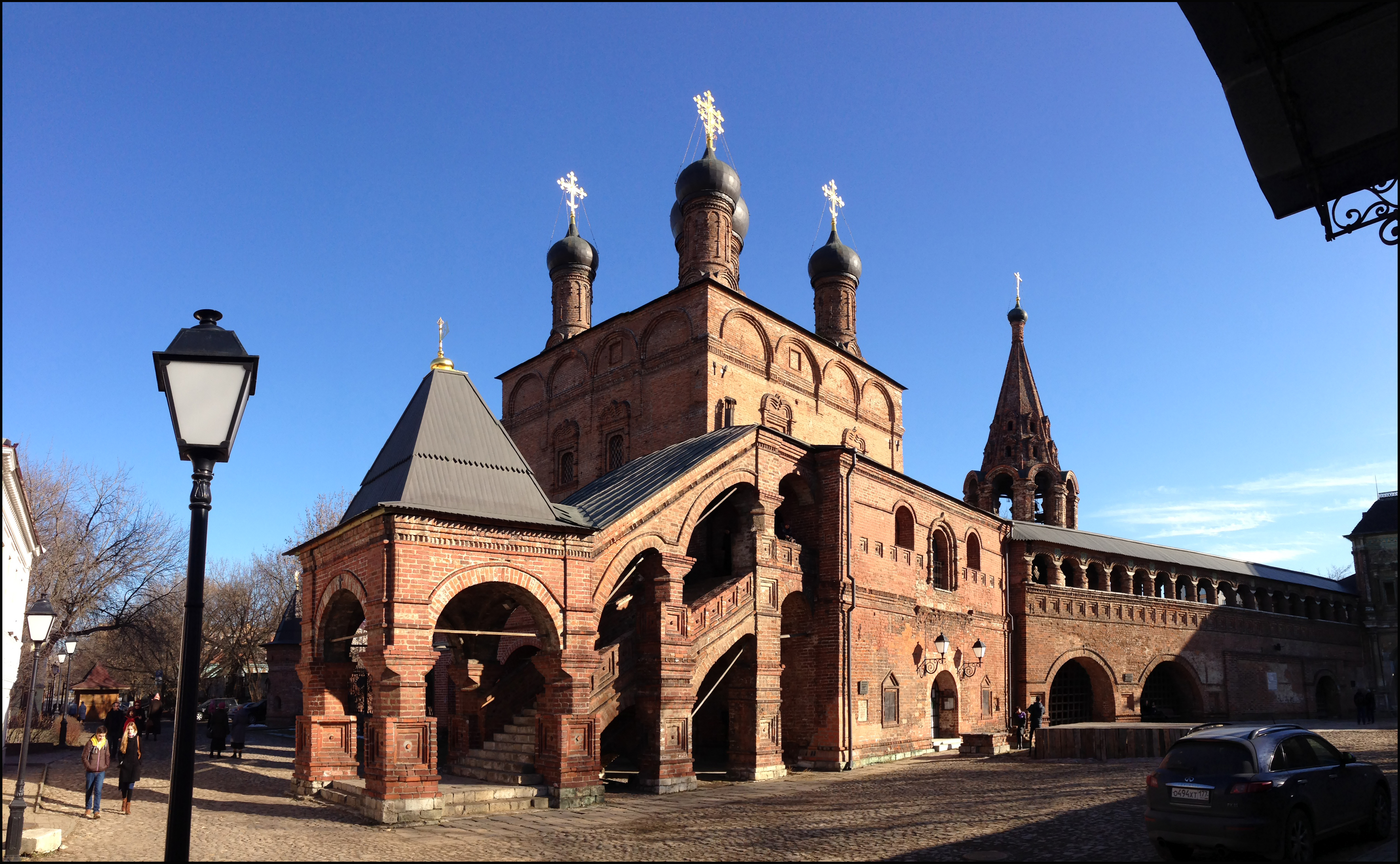 Крутицкое подворье